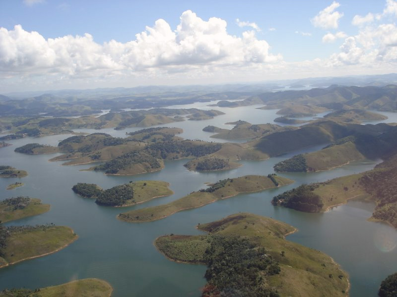 A Represa de Paraibuna banha os municípios de Paraibuna, Redenção da Serra e Natividade da Serra, além de vários outros povoados.